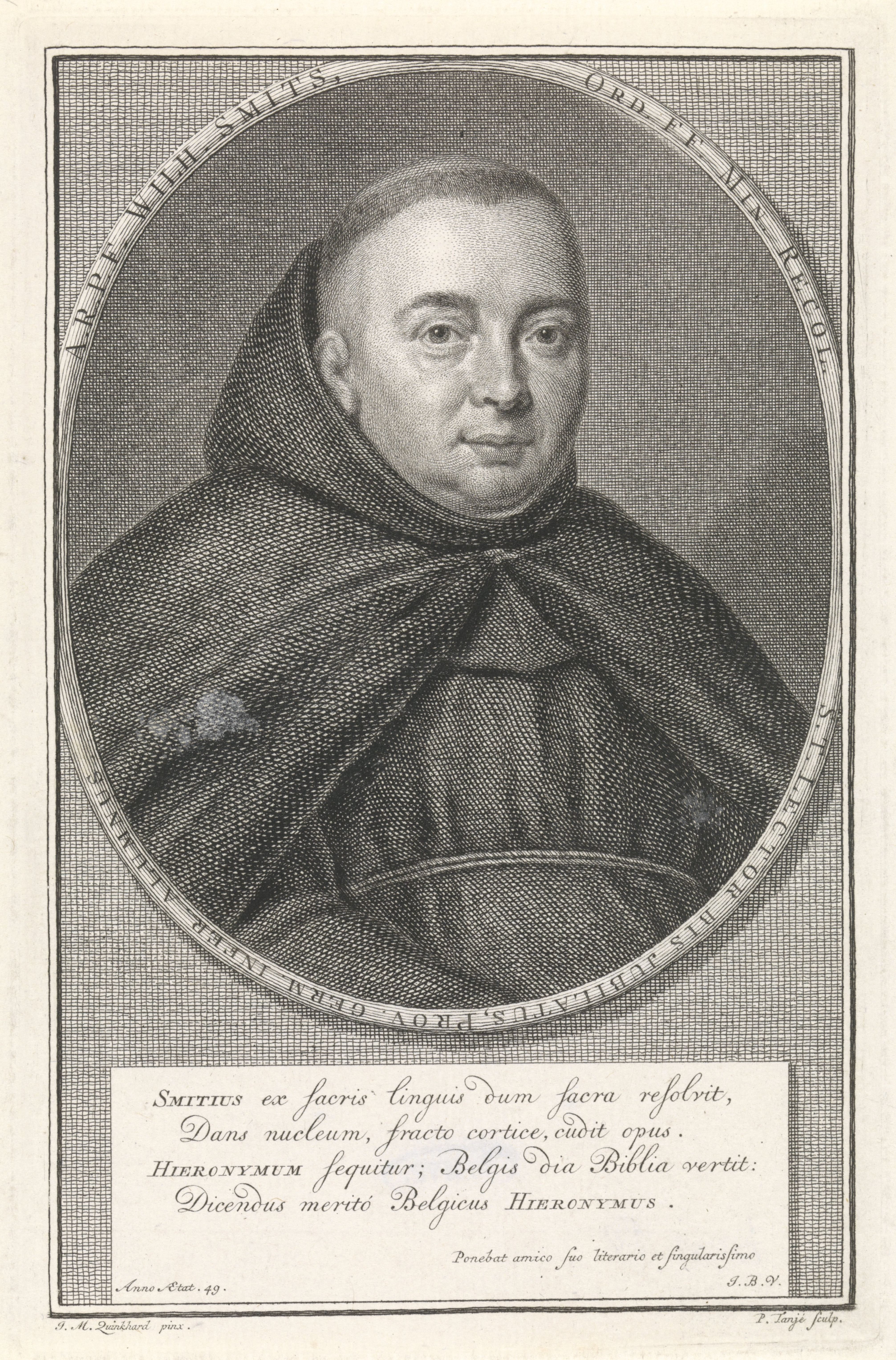 IdentificatieTitel(s): Portret van Willem SmitsObjecttype: prent Objectnummer: RP-P-1938-88Catalogusreferentie: Wurzbach 50FMP 4985-aCollectie Rijksmuseum-3(3)Opmerking: drie staten in de collectie van het RijksmuseumOpschriften / Merken: verzamelaarsmerk, verso, gestempeld: Lugt 2228Omschrijving: Portret van Willem Smits, monnik van de orde van de Recolletten en bijbeluitlegger. Onderaan in de marge een vierregelig vers in het Latijn.VervaardigingVervaardiger: prentmaker: Pieter Tanjé (vermeld op object)naar schilderij van: Jan Maurits Quinkhard (vermeld op object)schrijver: Monogrammist JBV (vermeld op object)Plaats vervaardiging: AmsterdamDatering: 1716 - 1761Fysieke kenmerken: gravure en etsMateriaal: papier Techniek: graveren (drukprocedé) / etsenAfmetingen: plaatrand: h 177 mm × b 115 mmOnderwerpWat: monk(s), friar(s)Wie: Willem SmitsVerwerving en rechtenVerwerving: onbekendCopyright: Publiek domein